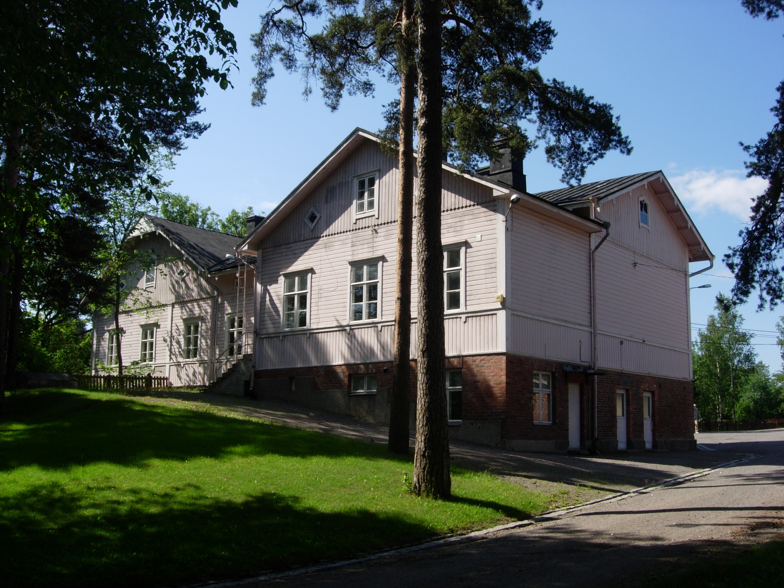 Kärsämäen koulu (oik. Pallivahan koulun Kärsämäen yksikkö) Kärsämäentieltä nähtynä. Arkkitehti Johan Östman, valmistunut 1881, lisärakennus 1913.